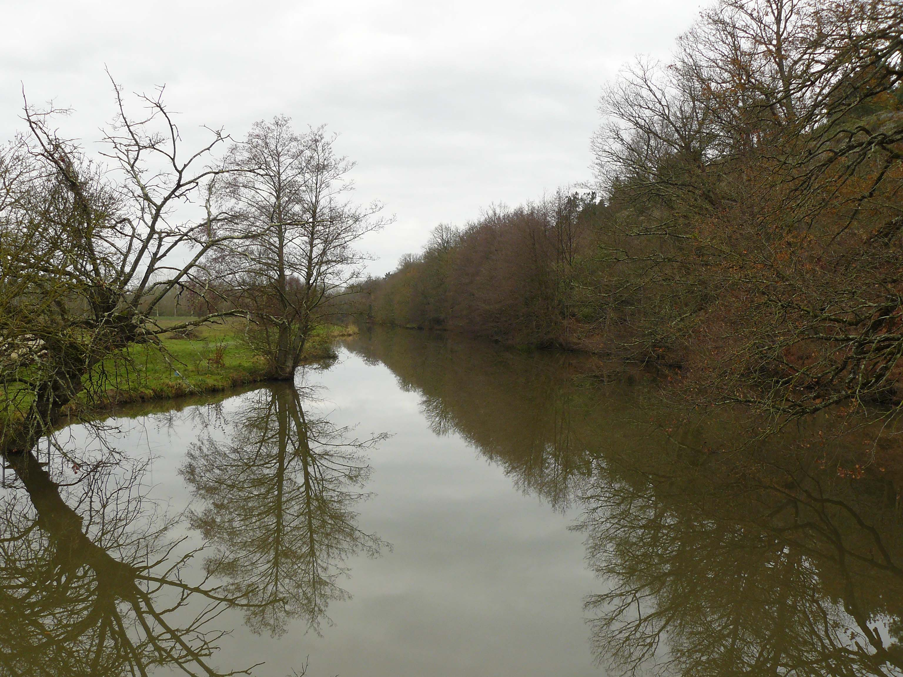 Le Don à Guémené-Penfao, France